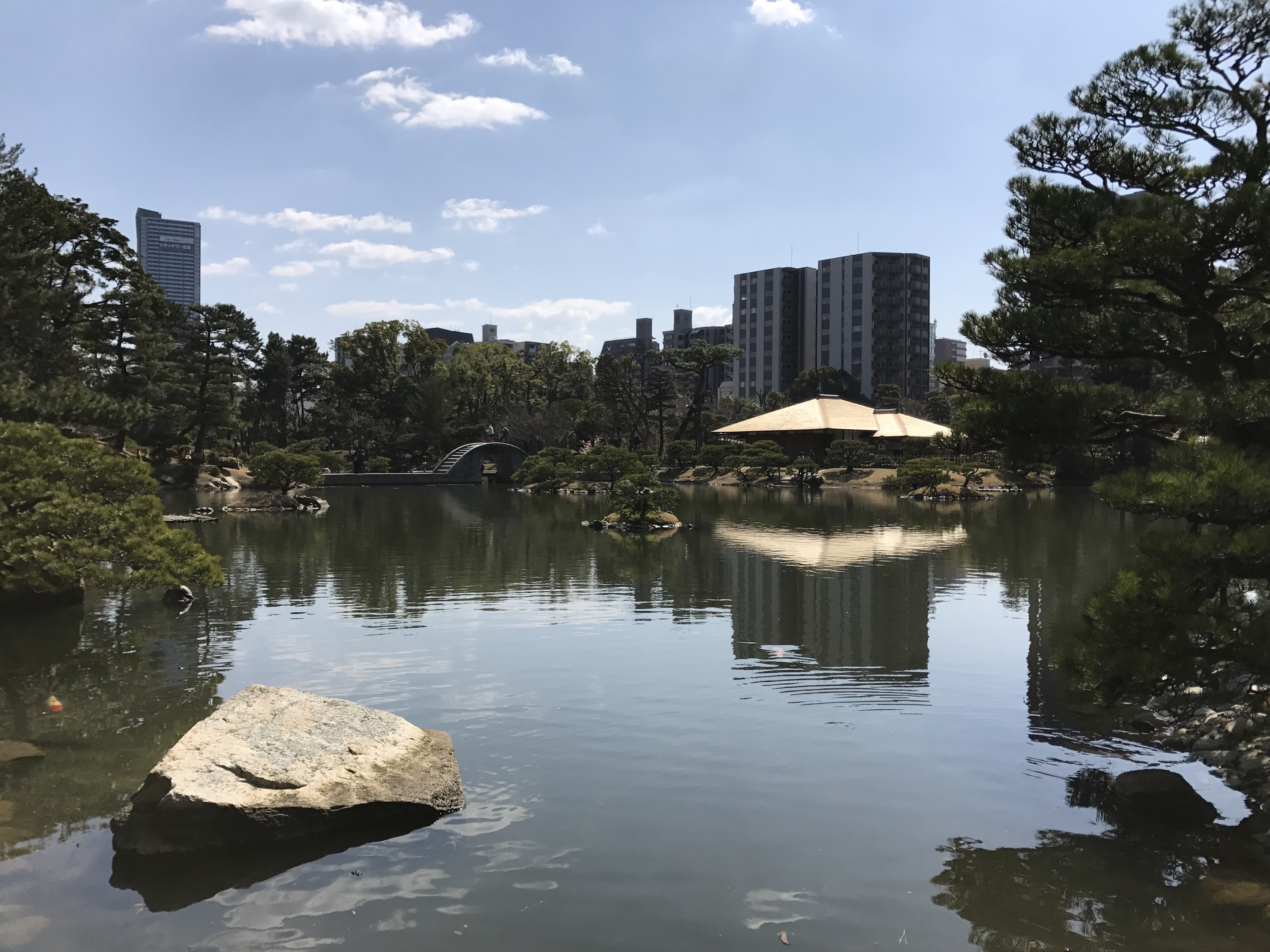 縮景園の古松渓より望む濯纓池と跨虹橋・清風館